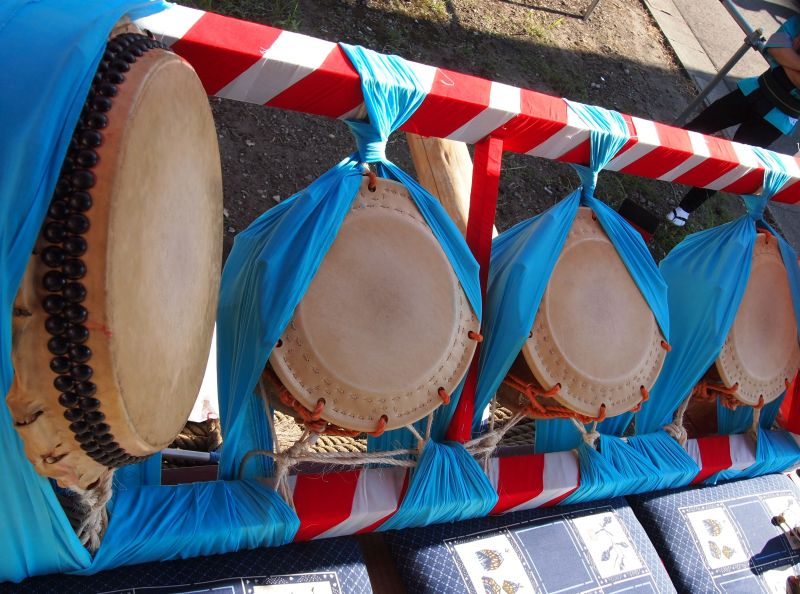 Tsuchizaki-Shinmeisha-Shrine Annual Celebration And The Float Festival (Akita City, Japan)